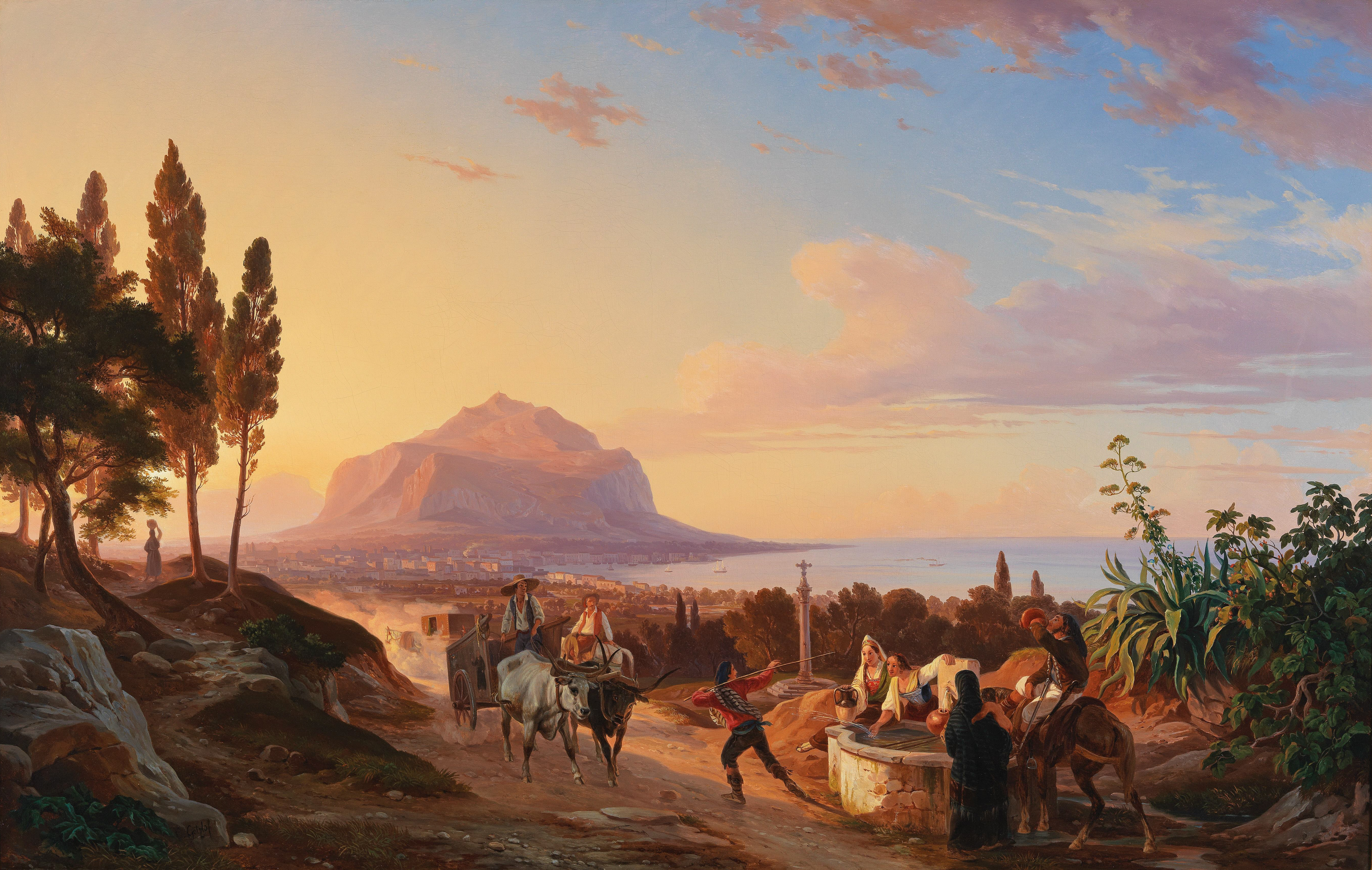 Reisende an einem Brunnen, im Hintergrund der Monte Pellegrini, Palermo, signiert C. Götzlof, Öl auf Leinwand, 78,8 x 121,9 cm Provenienz: Auktion Sotheby’s London, 18. November 2003, Lot 333.